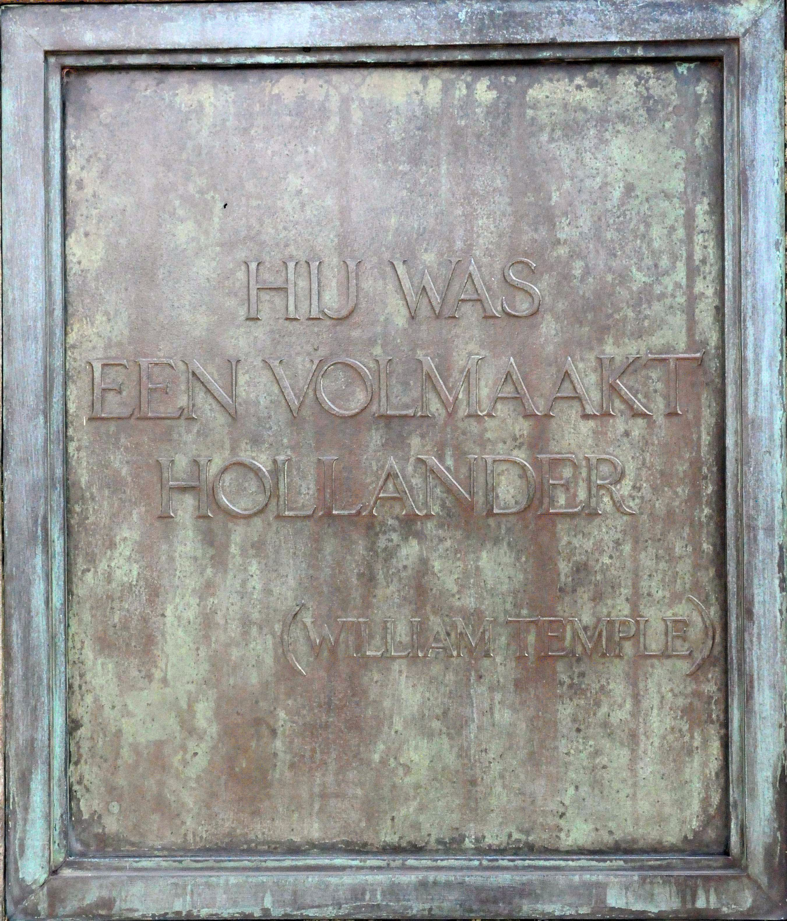 Quote from British diplomat William Temple about Johan de Witt